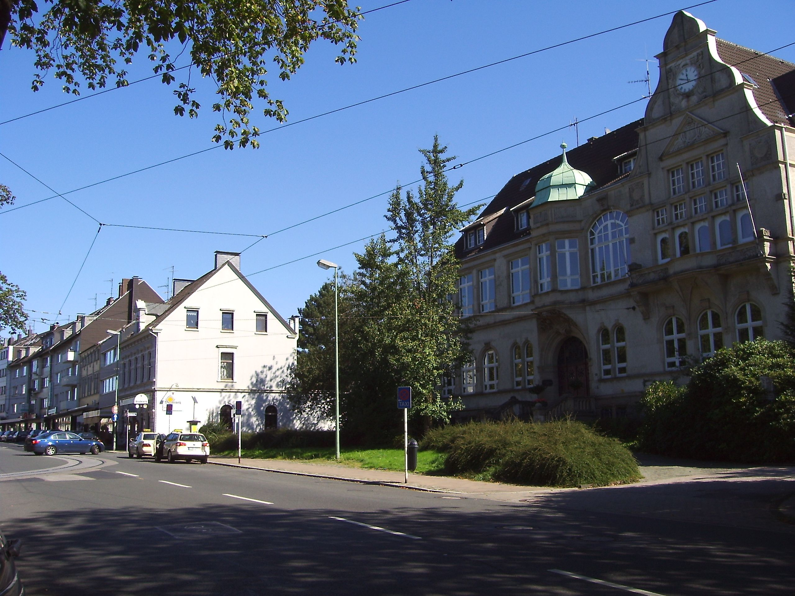 Essen-Bredeney, Germany, Rathaus